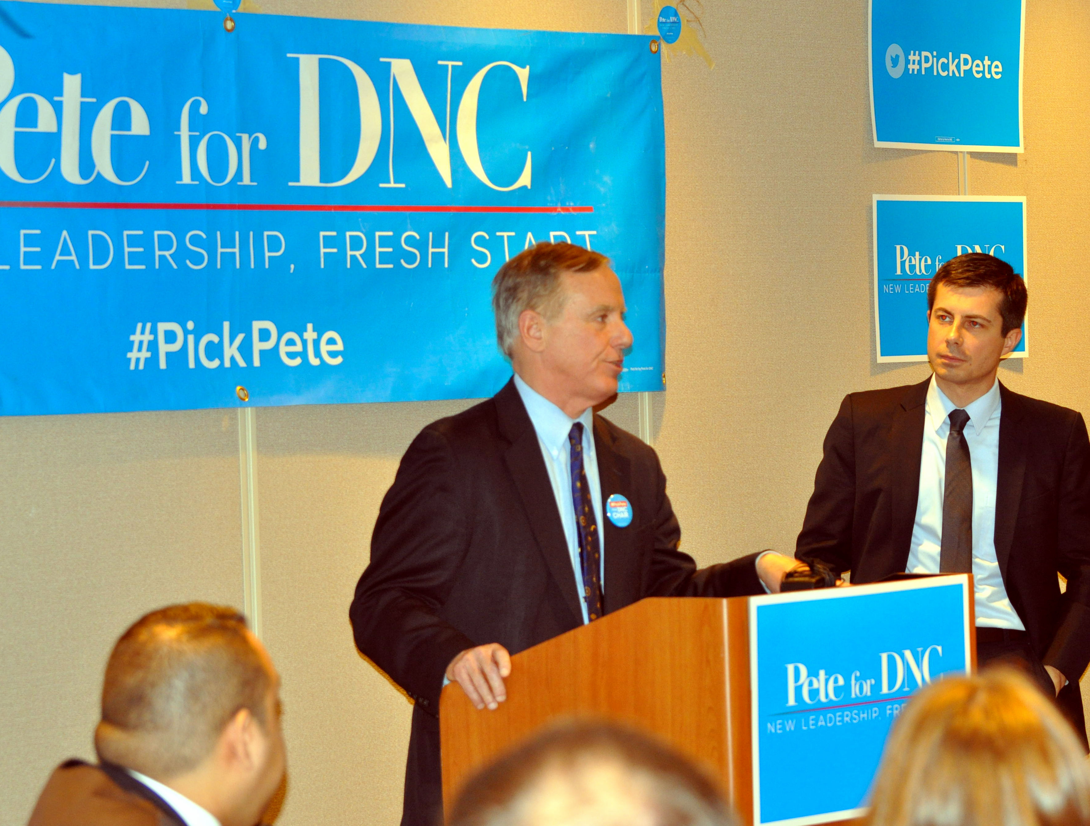 DNC Winter Meet 0069 Howard Dean + Pete Buttigieg